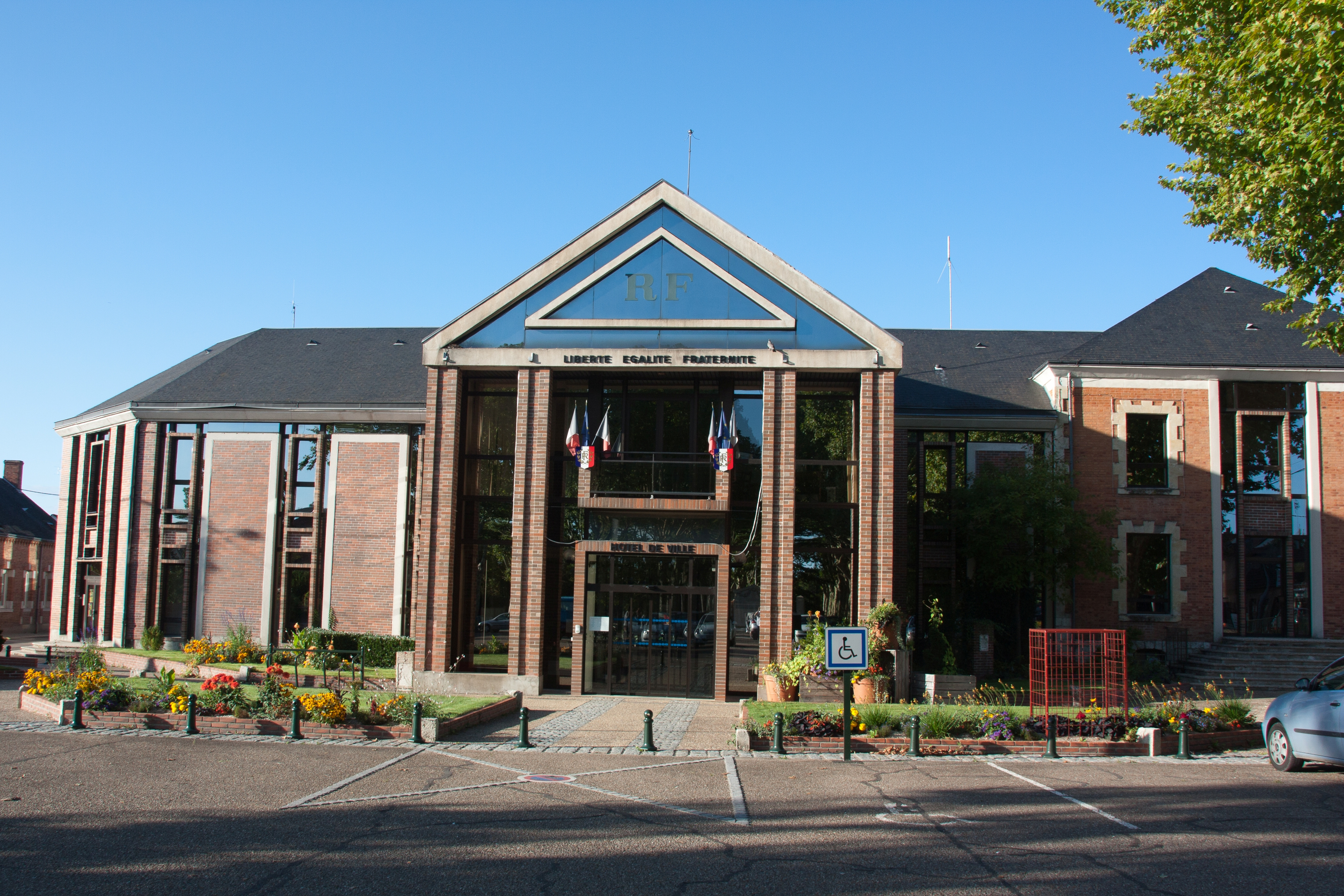 Mairie de La Ferté-Saint-Aubin - La Ferté-Saint-Aubin, Loiret, France.